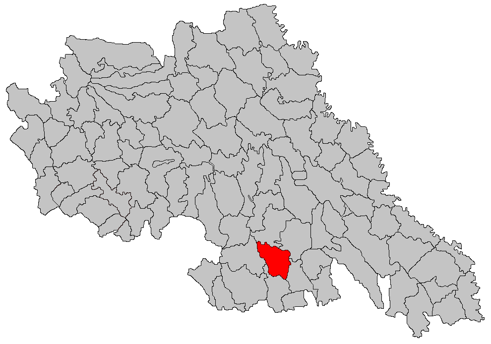 Categorie:Hărţi ale judeţului Iaşi